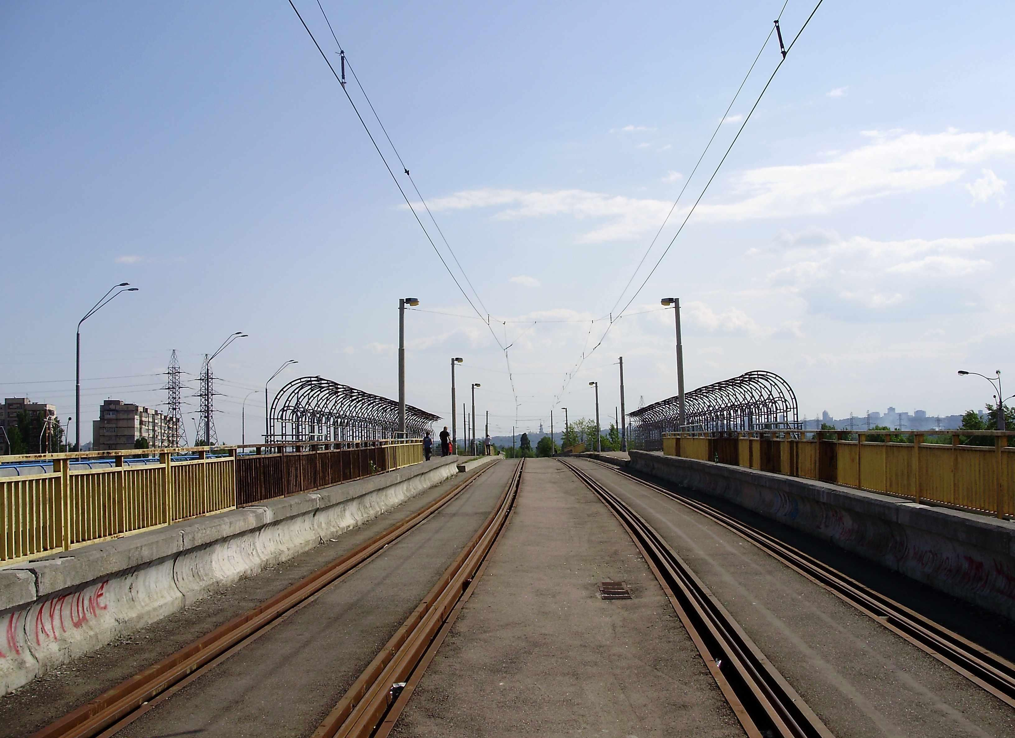 Ст. Ватутіна Лівобережної лінії Київського Швидкісного трамваю